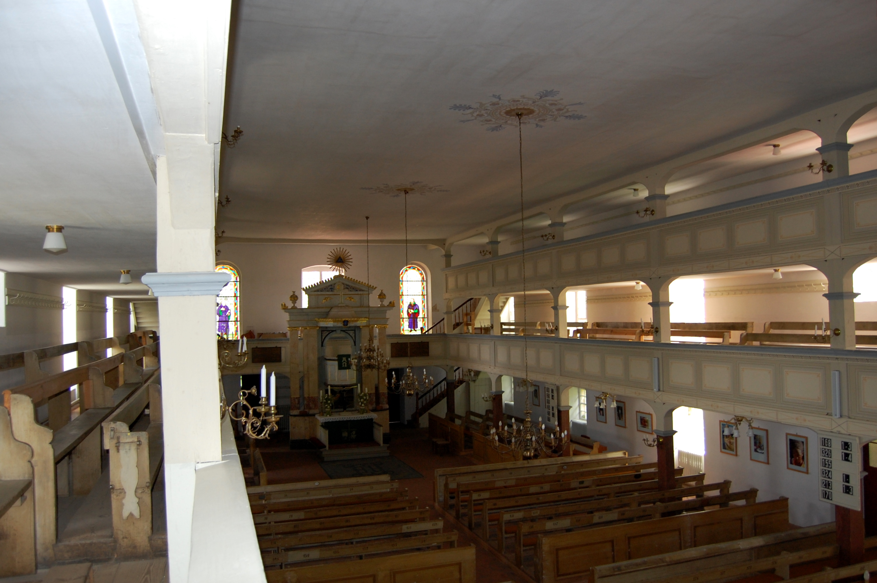 Pfarrkirche Burg, Blick von der nördlichen Empore